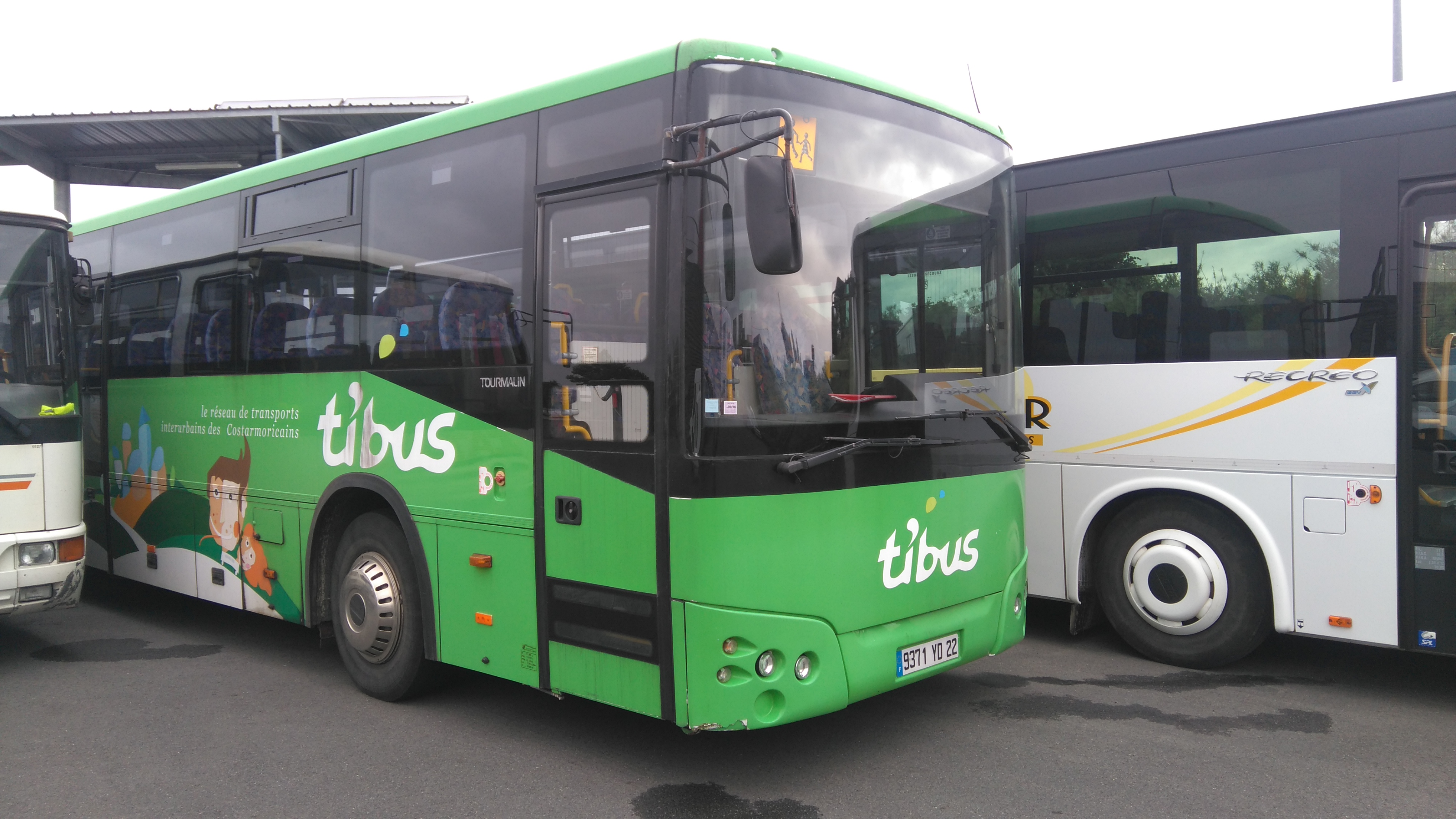 Temsa Tourmalin Ti'Bus